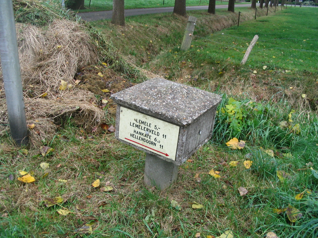 Paddestoel model Boost